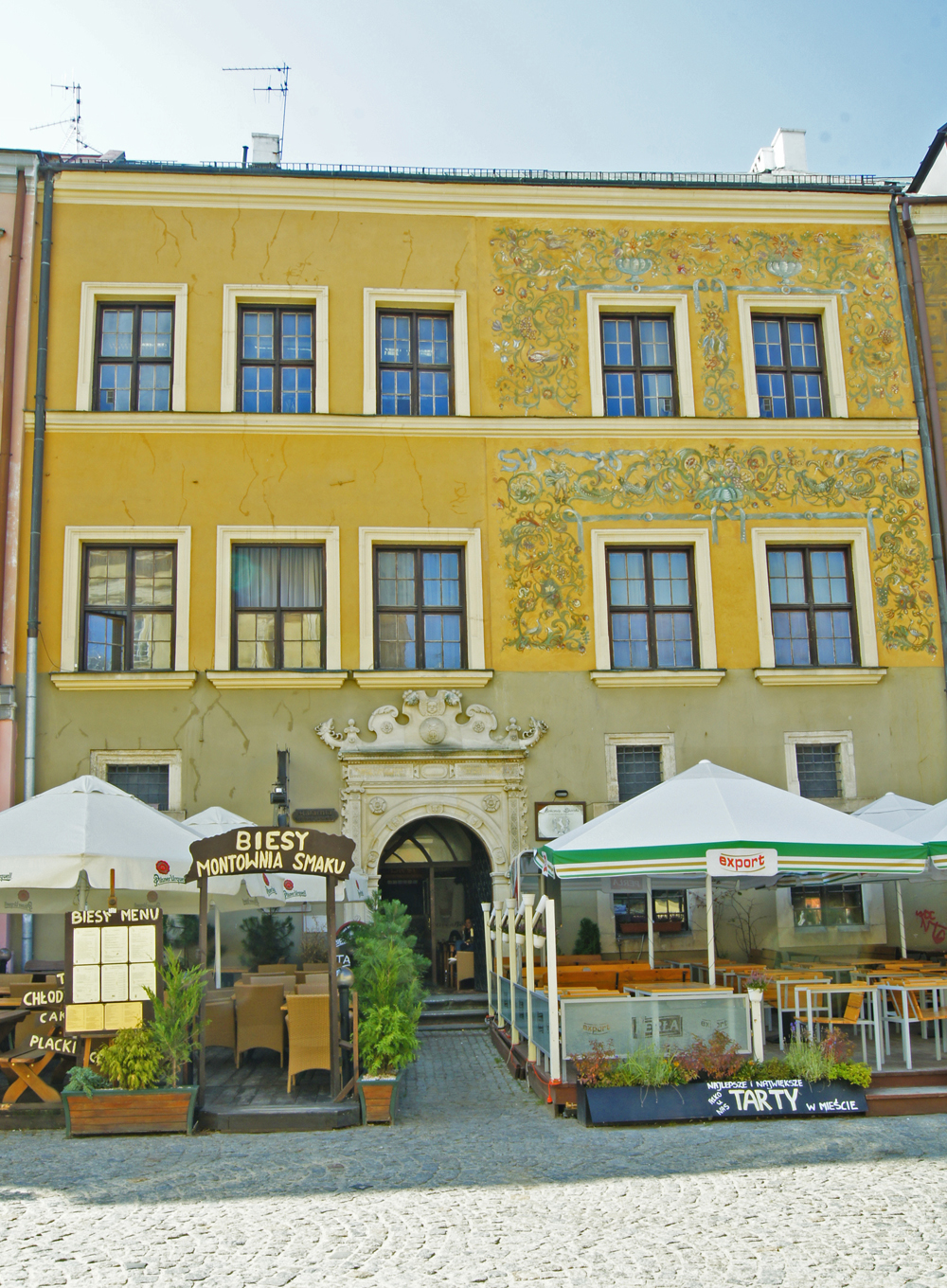 Lublin, Rynek 18 - kamienica (zabytek nr A/481)